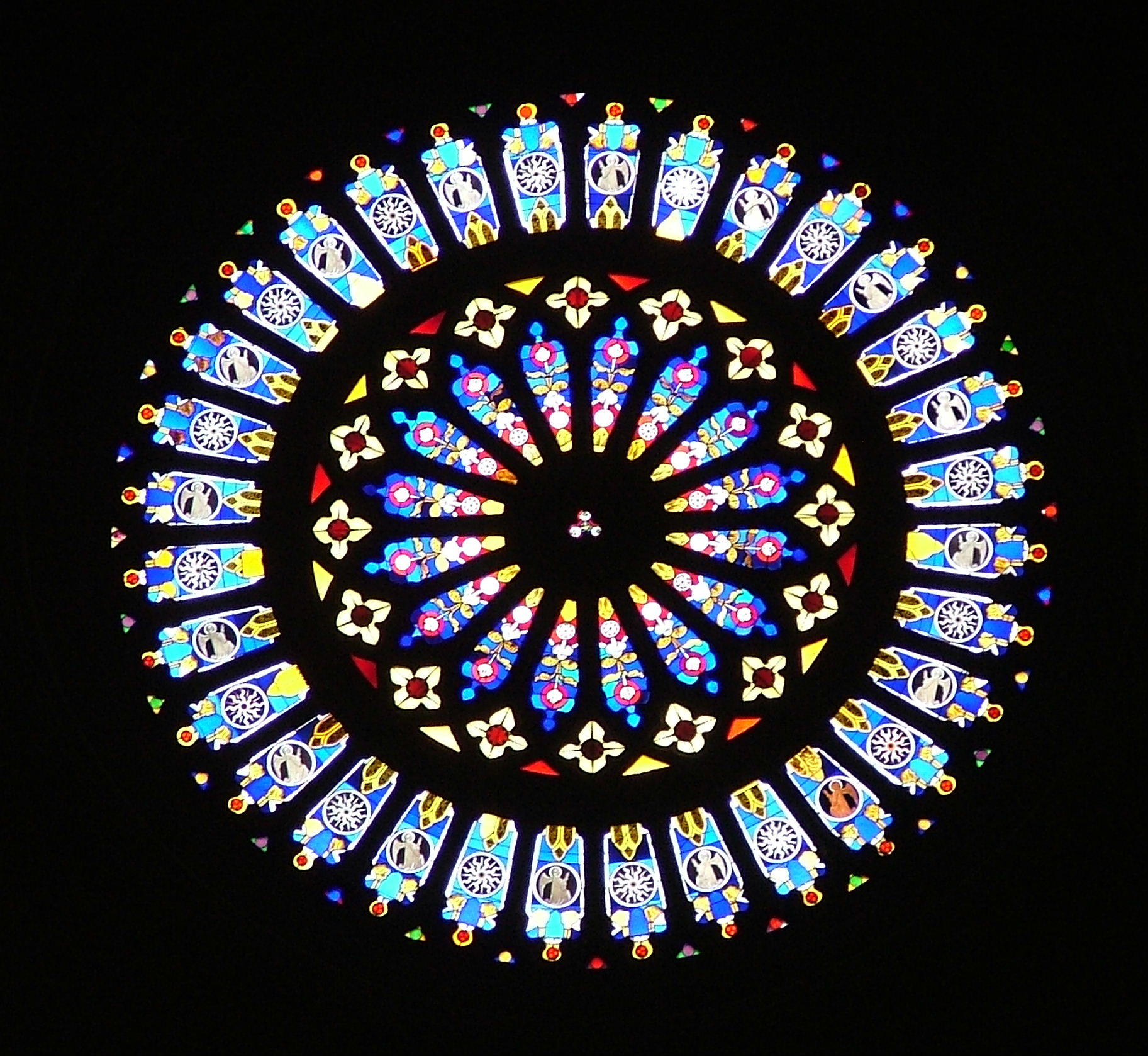 Como Rosette im Dom